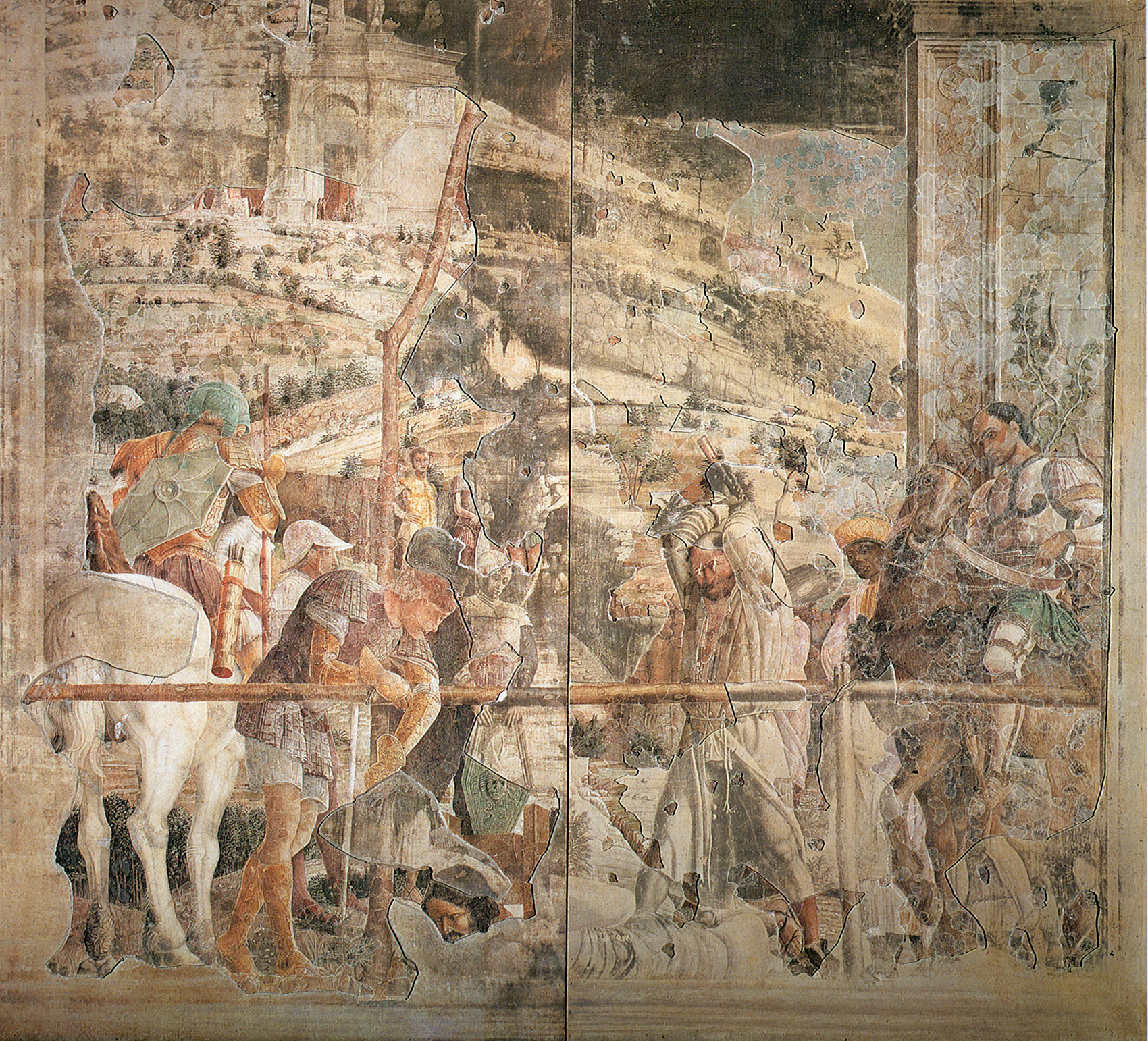 present situation